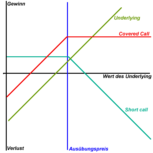 Auszahlungsdiagramm eines Covered Call